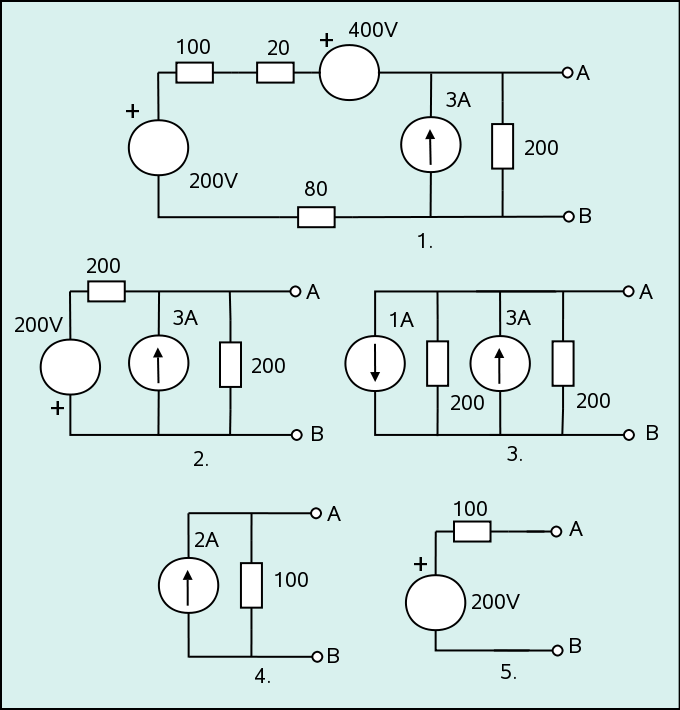 Circuito ejemplo (Example circuit)